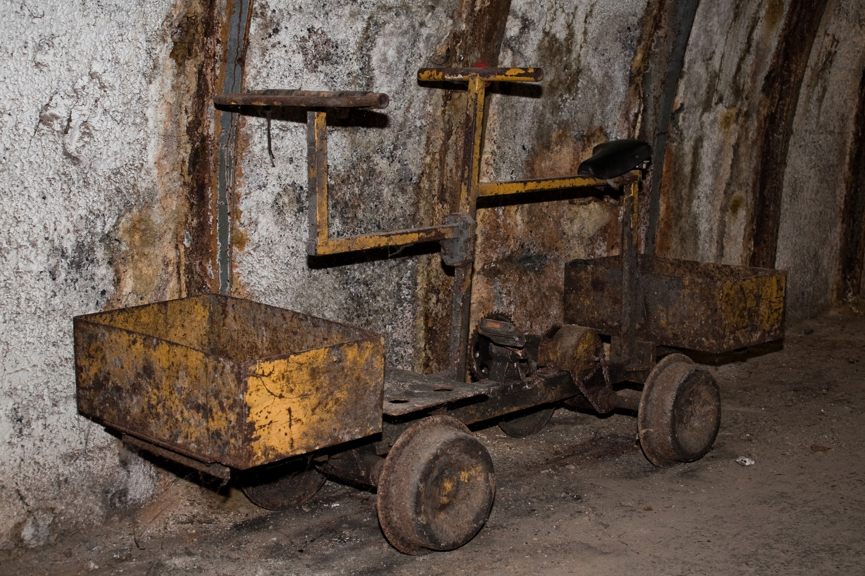 Dieses alte Grubenfahrrad steht im Trainingsbergwerk Recklinghausen